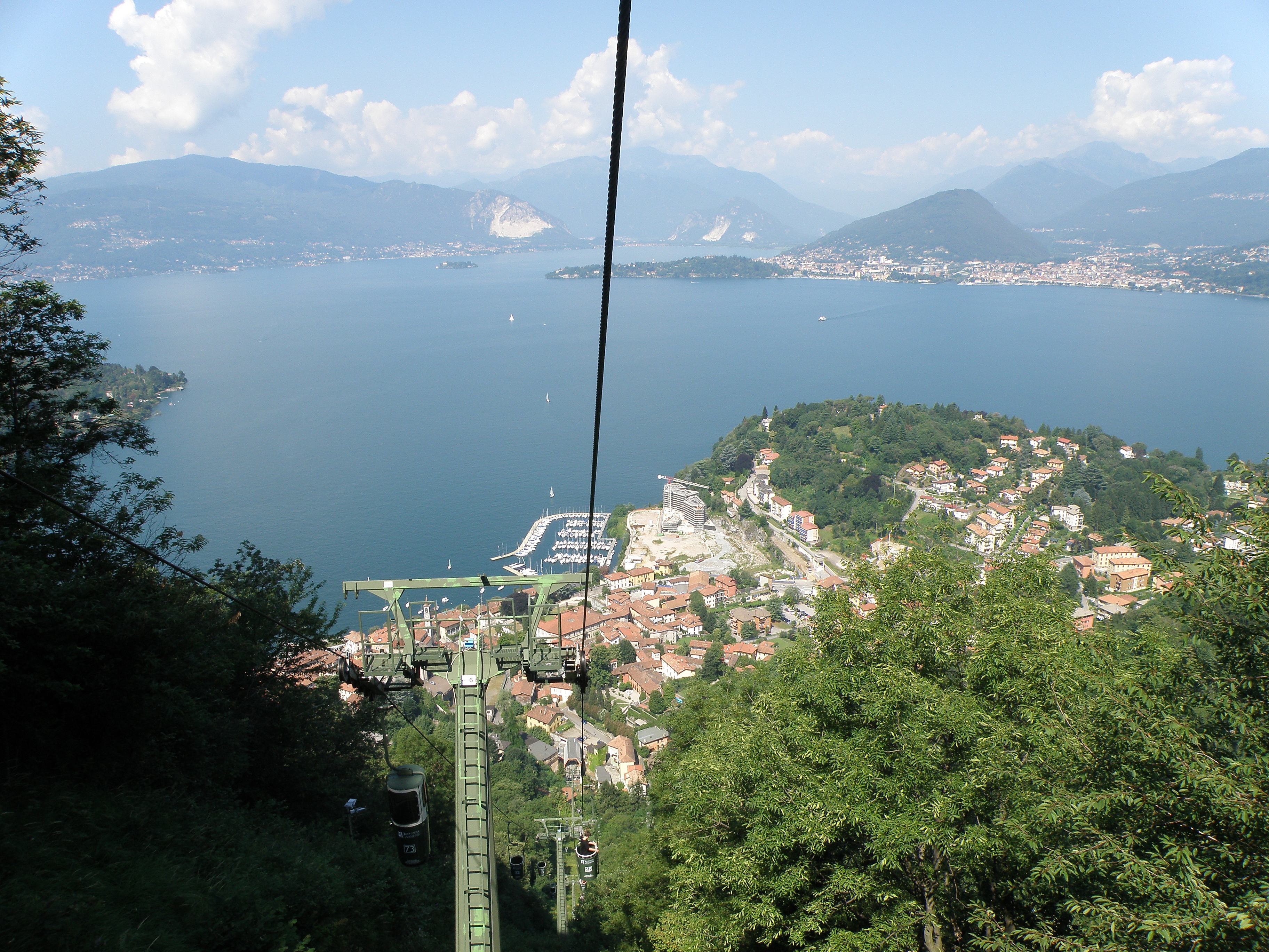 Laveno-Mombello (VA). Funivia.